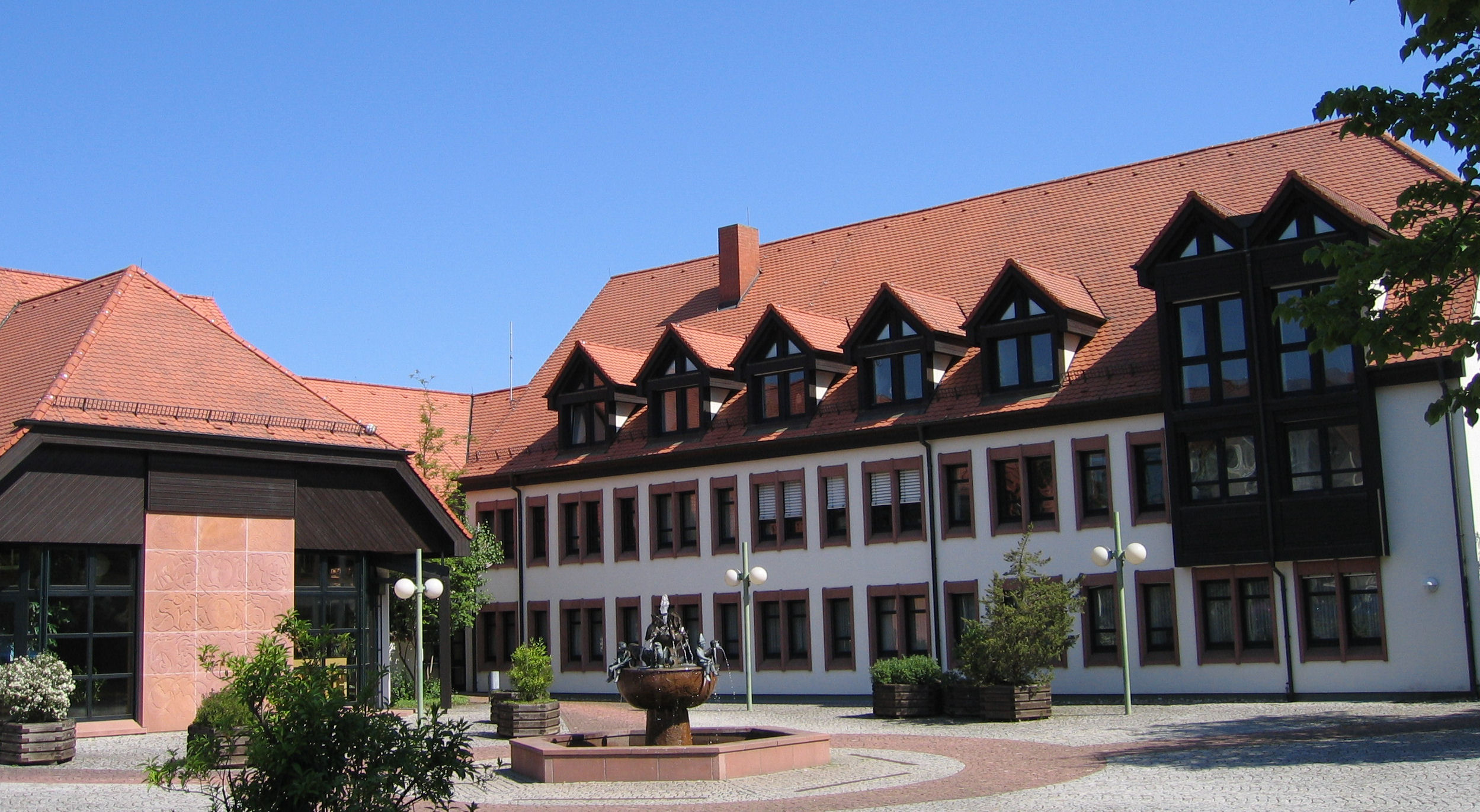 building in Enkenbach, Germany